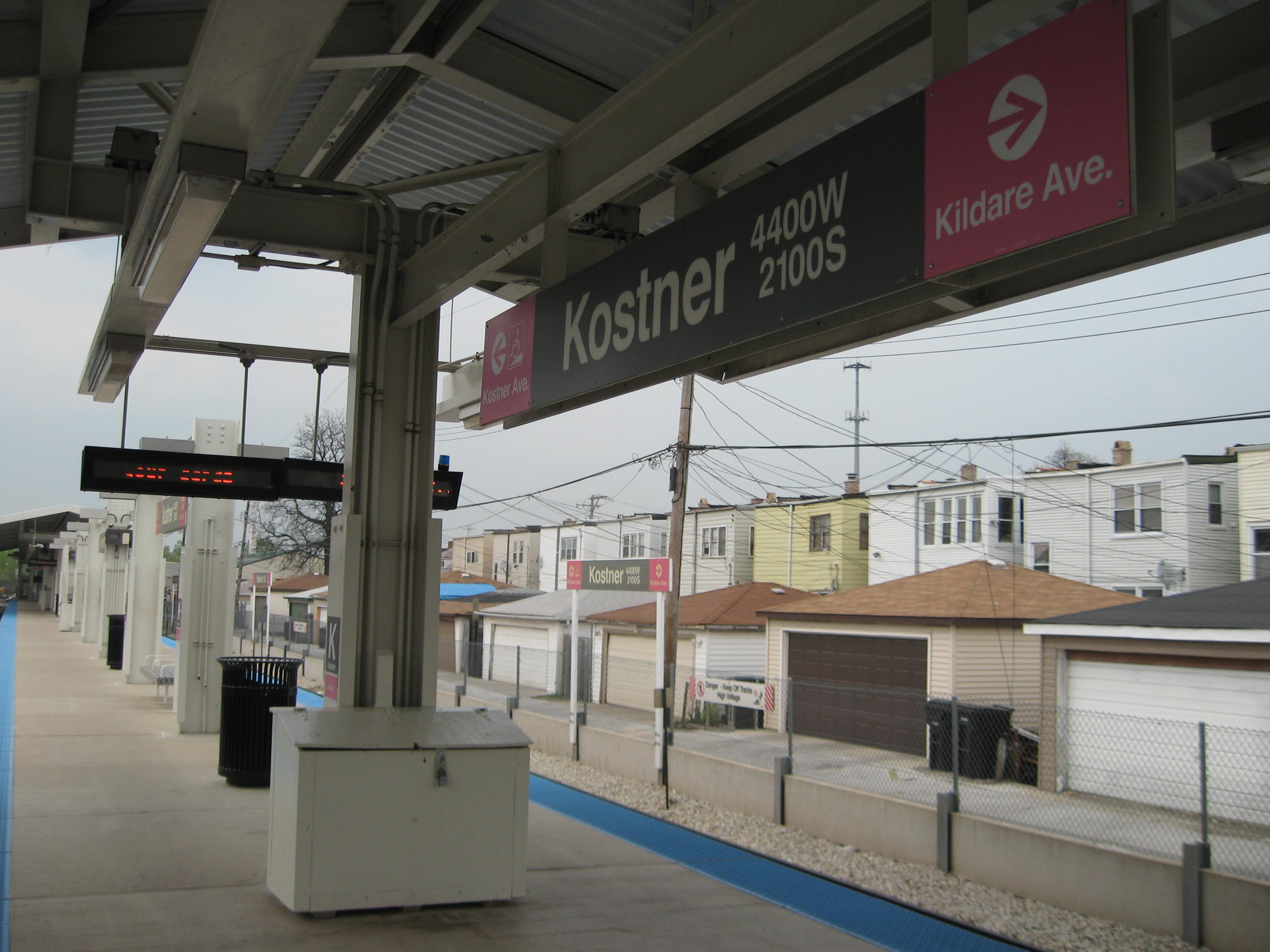 Kostner CTA Pink Line